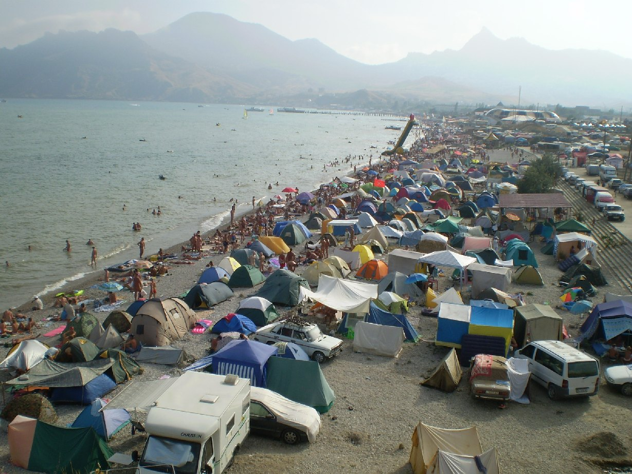 Nudist_beach_in_Koktebel